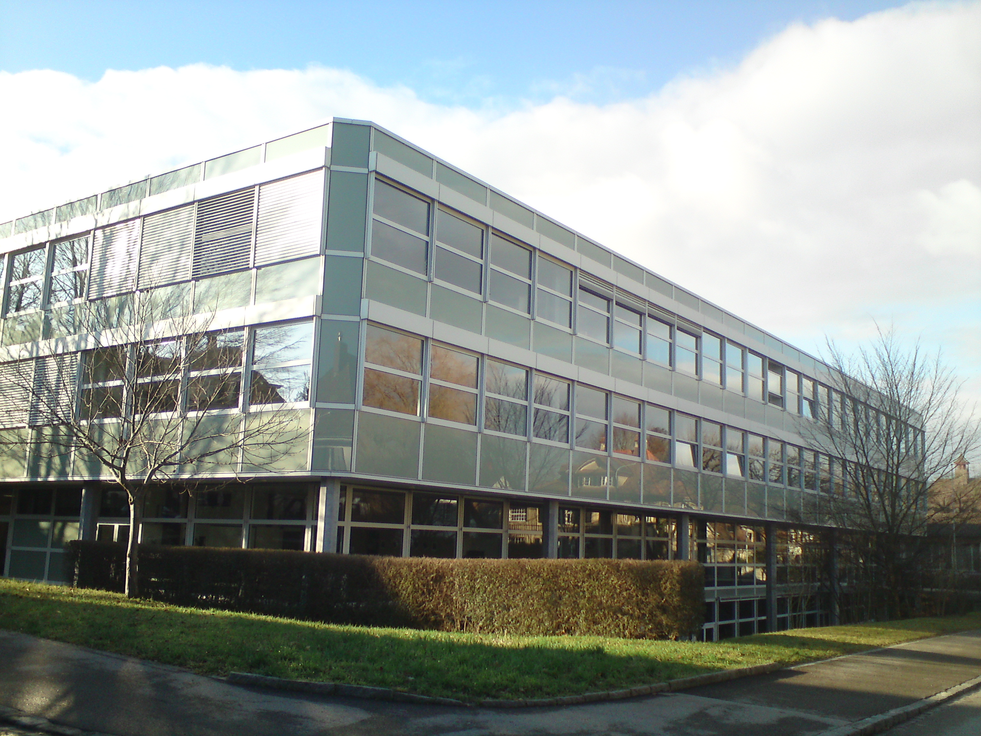 Ansicht des Nebaus der NKSA